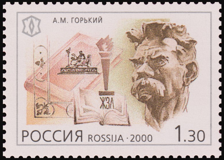 М. Горький.